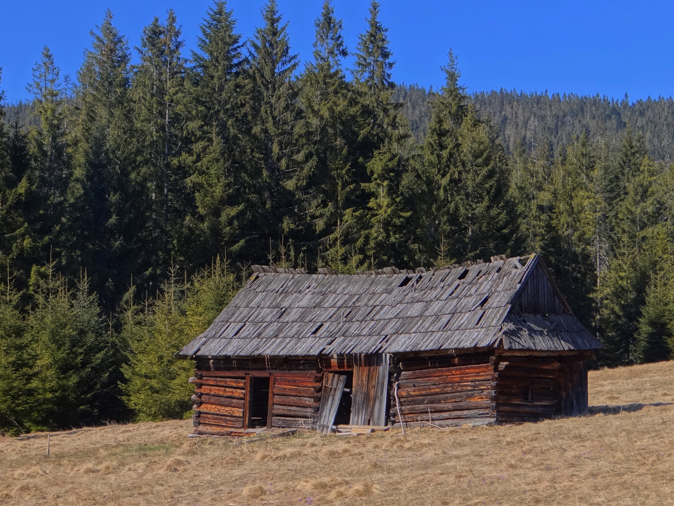 Szałas na cichej Polanie (Przysłop Witowski)